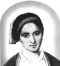 Милица Стојадиновић Српкиња Извор